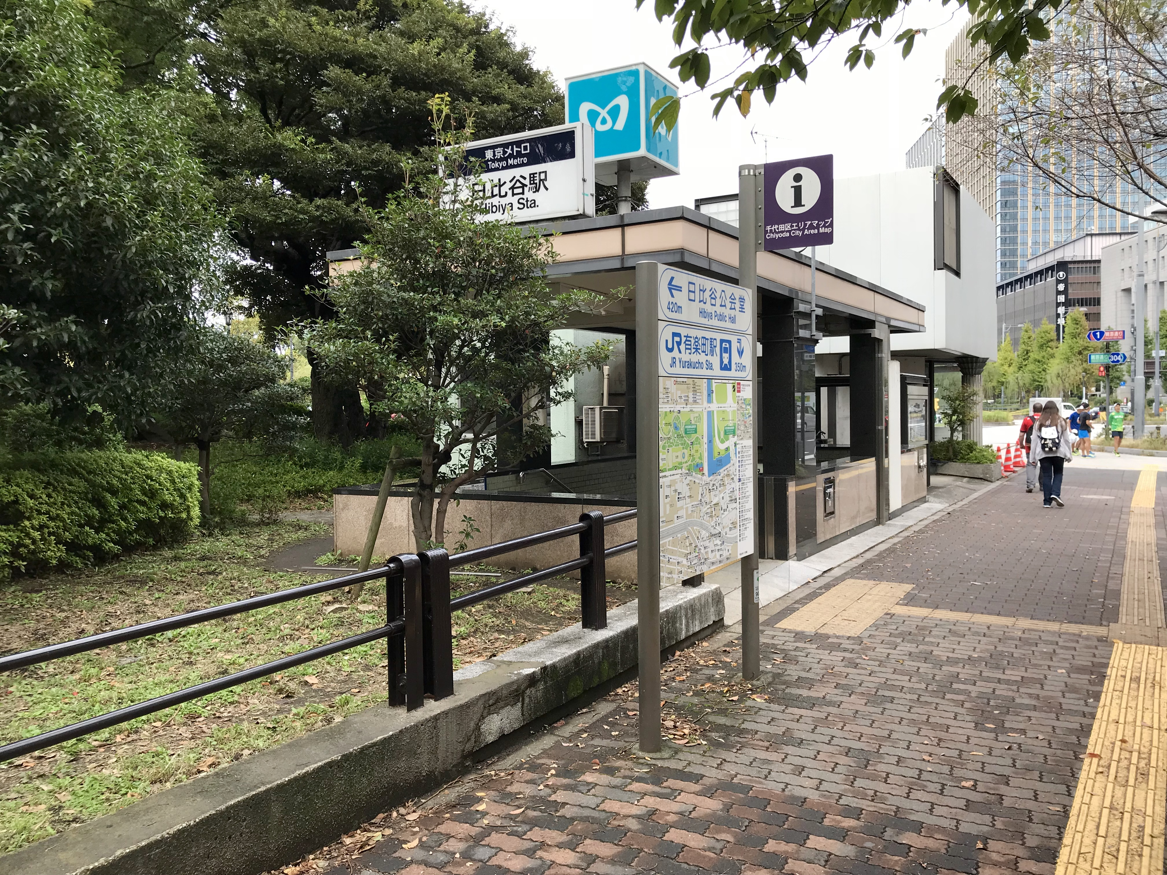 東京メトロ千代田線・日比谷線日比谷駅A10番出入口